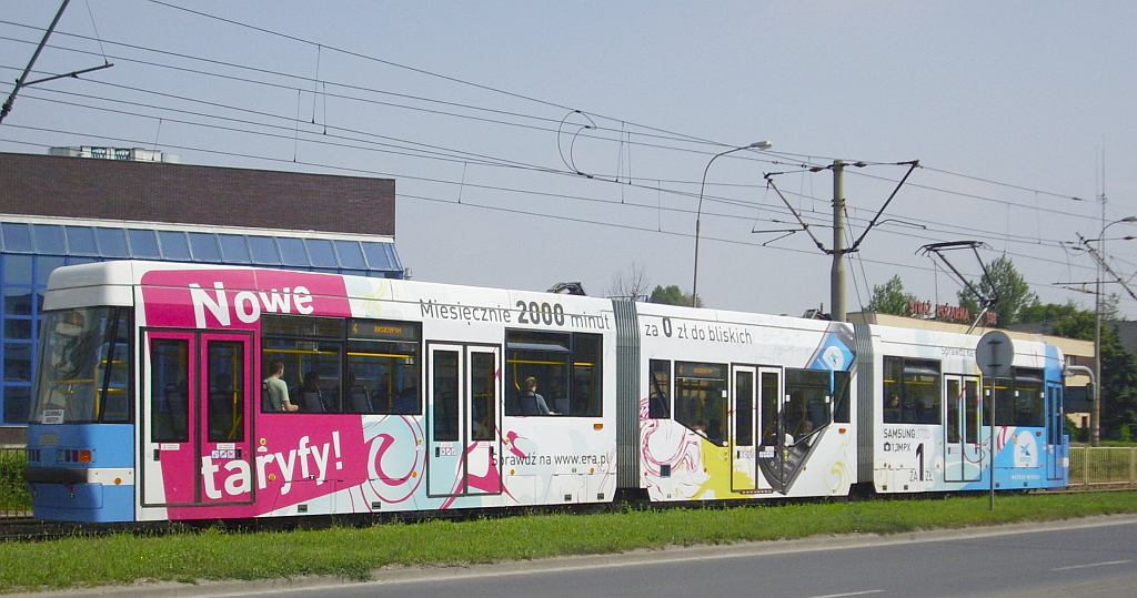 Tramwaj Protram 205 WrAs na ul. Grabiszyńskiej.